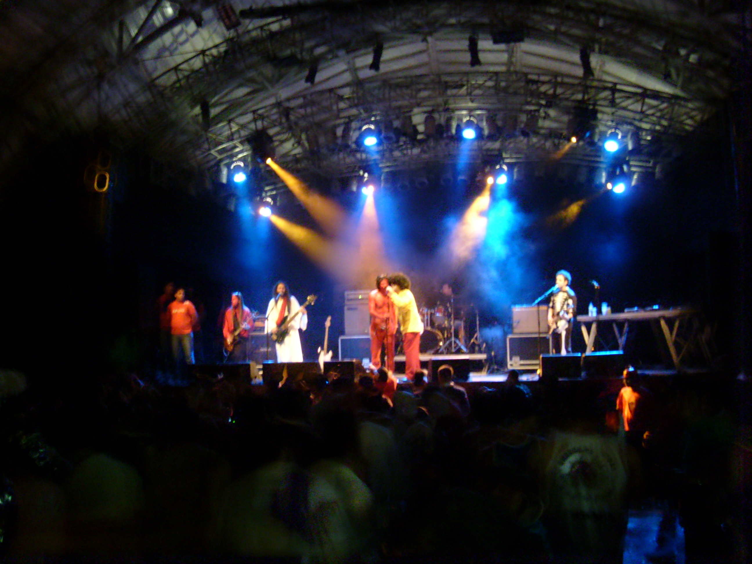 Palco do Circo Voador, no bairro da Lapa, Rio de Janeiro, em 2008.